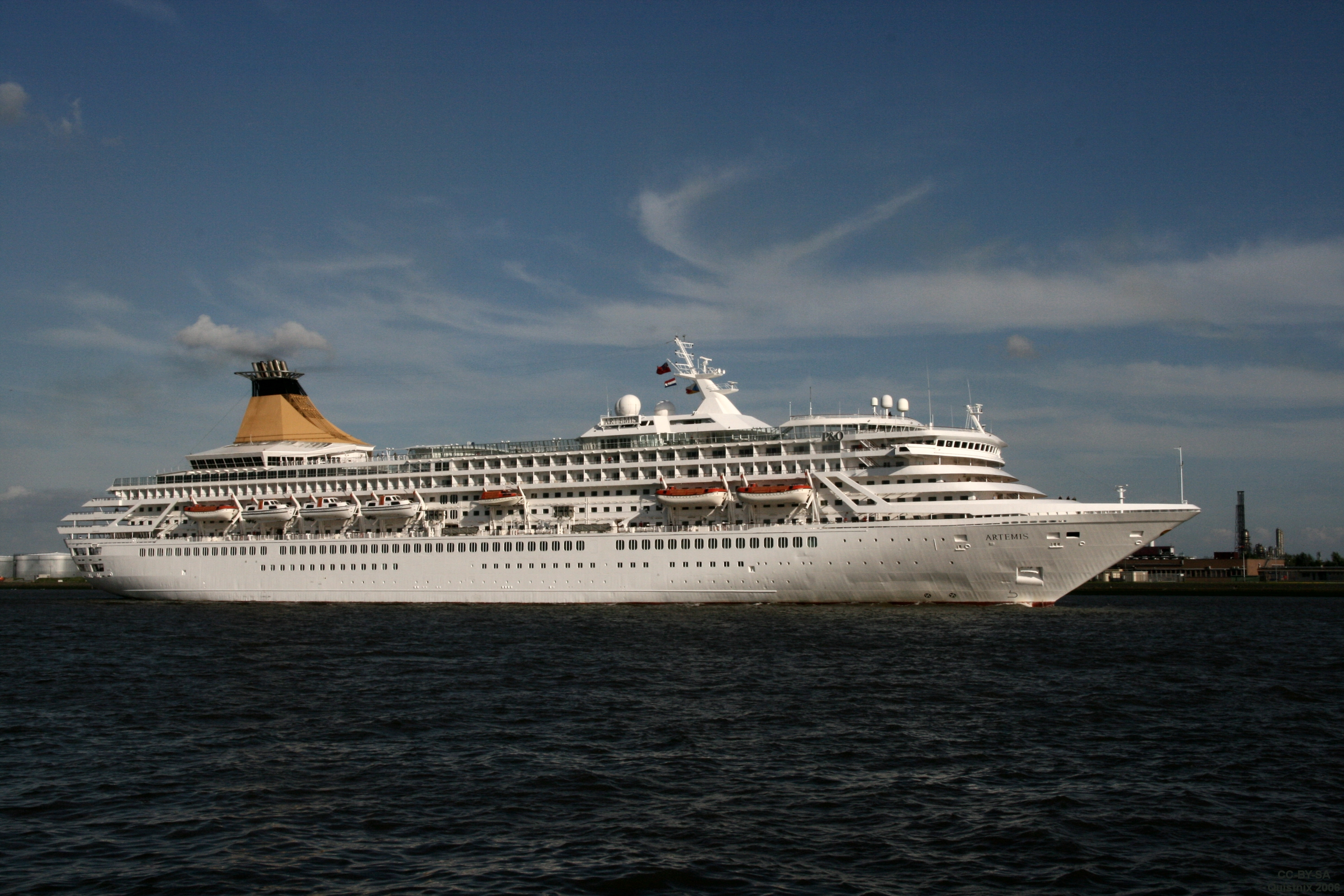 Cruiseship Artemis, departing from Rotterdam, photo taken in Vlaardingen, NL